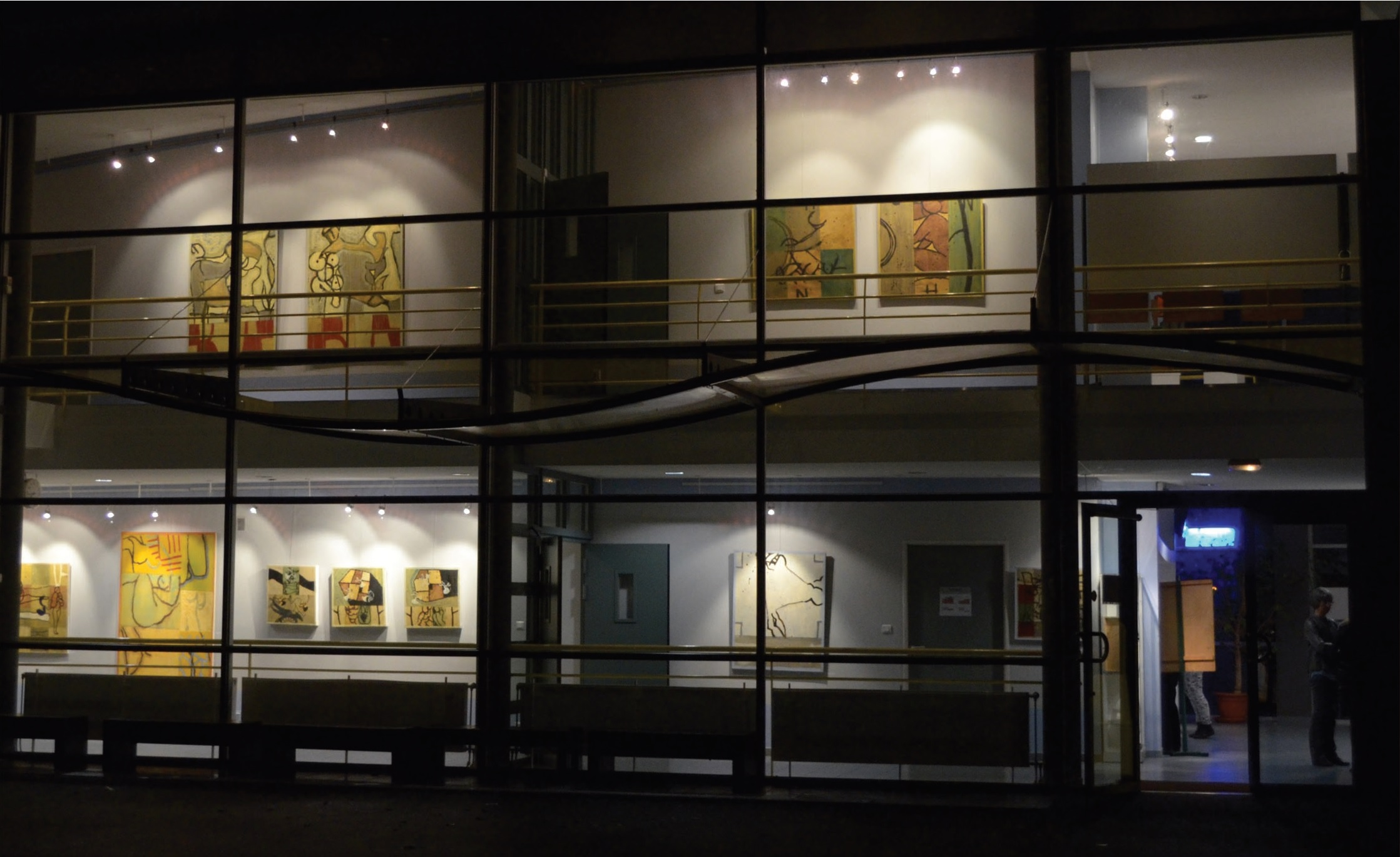 Galerie d'art au collège de Riscle